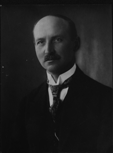 Václav Posejpal (1874 - 1935), Český fyzik.